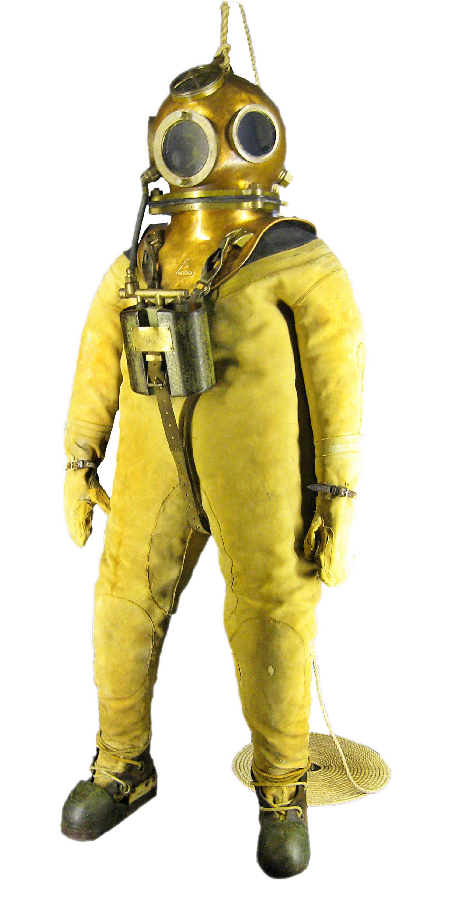 Taucheranzug German Museum of Technology Native nameDeutsches Technikmuseum BerlinLocationBerlinCoordinates52° 29′ 55″ N, 13° 22′ 39″ E Established1983Web page control : Q706530 VIAF: 150642200 ISNI: 0000 0001 0121 6426 LCCN: n97103087 GND: 2162237-1 SUDOC: 075899728 WorldCat institution QS:P195,Q706530